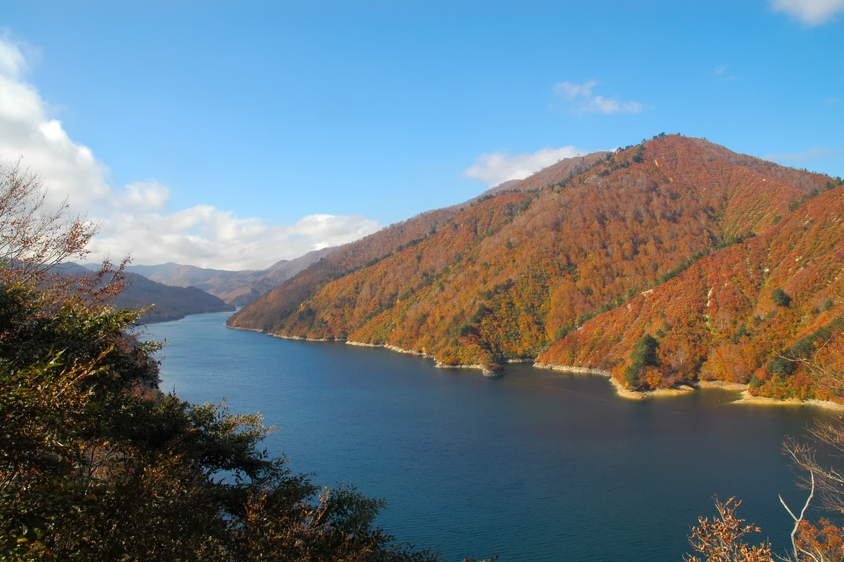 Lake Okutadami (奥只見湖)